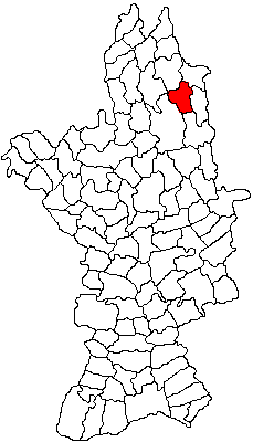 Categorie:Hărţi ale judeţului Olt